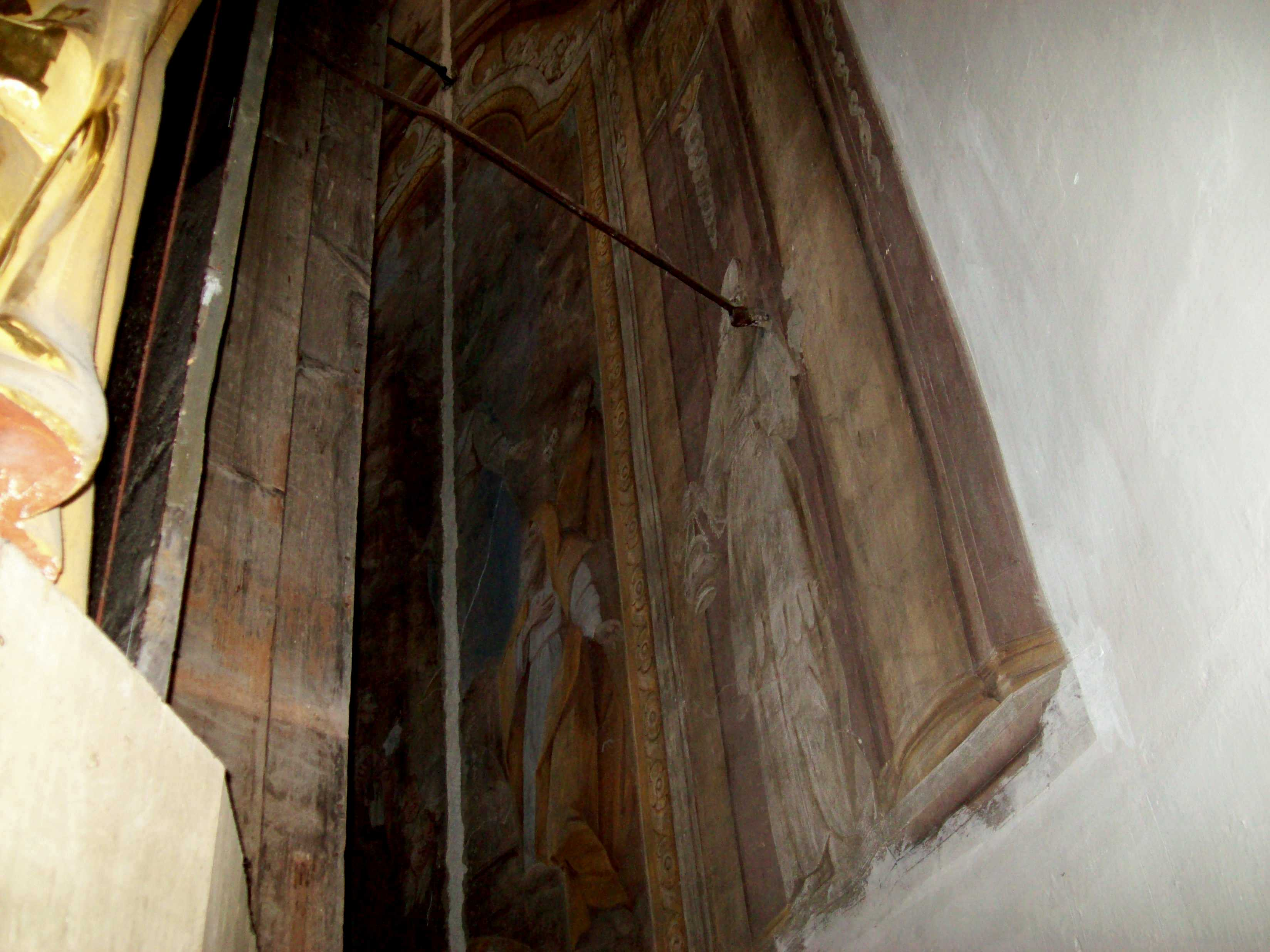 Altarbild, rechts " Himmelfahrt Mariens und die Hl. Dreifaltigkeit" 1753 von Johann Georg Unruhe (1724-1801) al-fresco gemalt